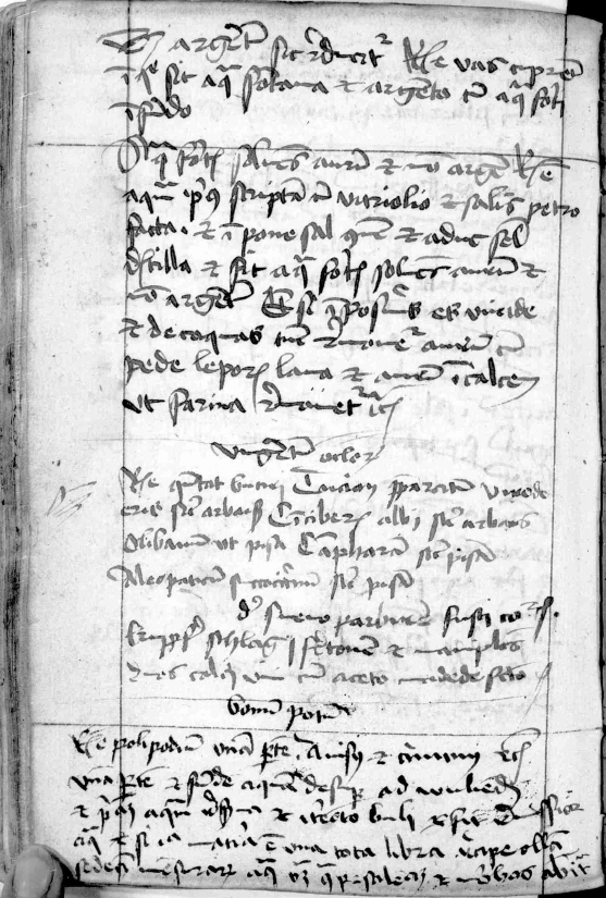 Dies ist eine Seite des Codex germanicus monacensis 415, der sich in der Bayerischen Staatsbibliothek in München befindet. Hier werden medizinische, chemische, alchemistische Zauber- und Hausrezepte beschrieben.